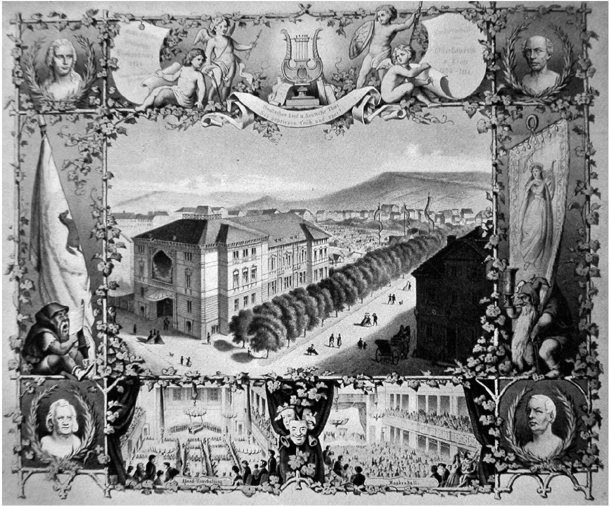 Stuttgart, Germany, Liederhalle 1864